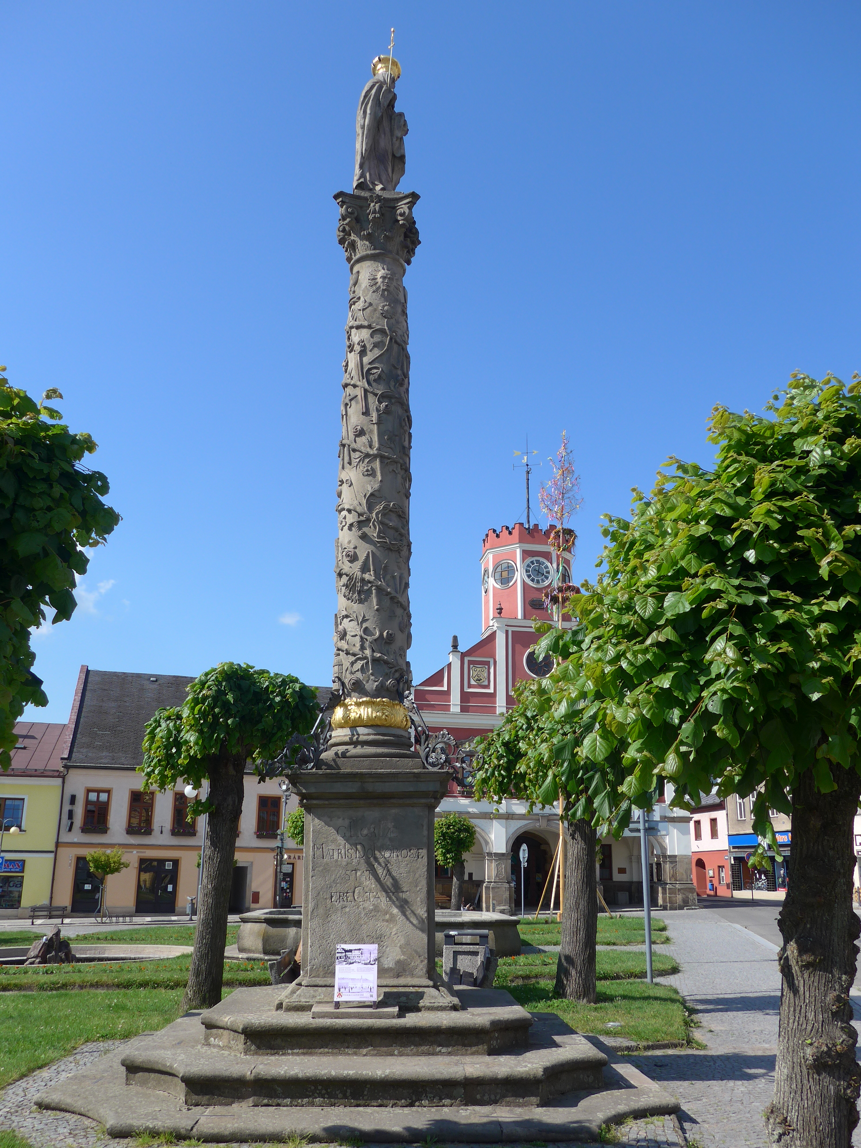 Mariánský sloup na Masarykově náměstí, Jan Brokoff 1707